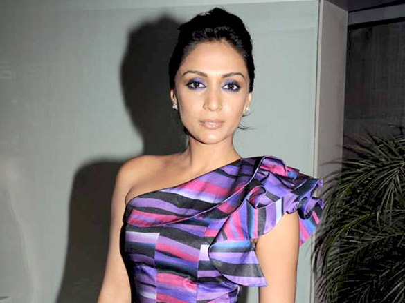 Shweta Salve at Svenska Design Hotel